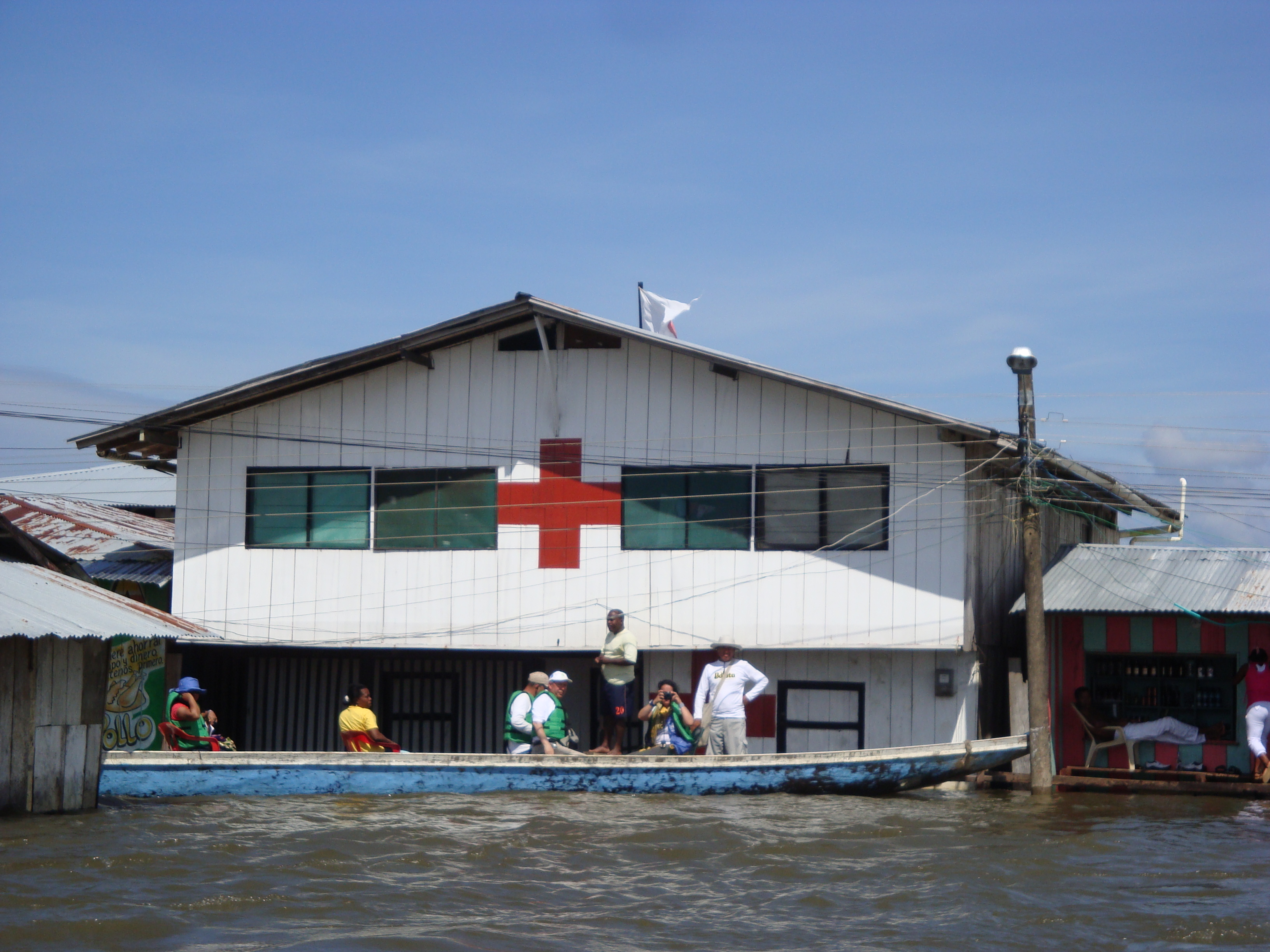 Exterior de una sede de la Cruz Roja, en Riosucio, Chocó.